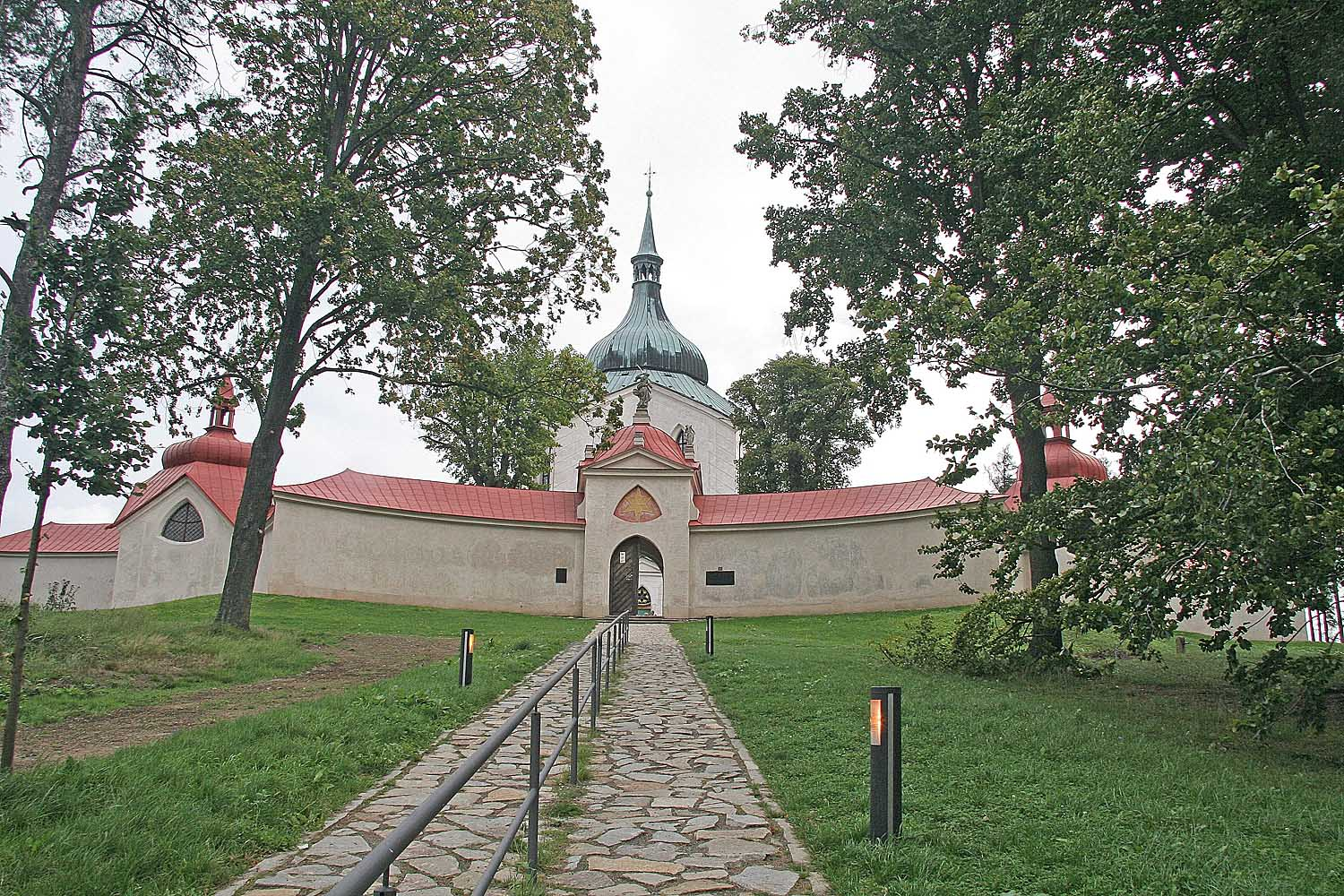 Poutní kostel Sv. Jana Nepomuckého, district Žďár nad Sázavou, Czech Republic Autor: Prazak Date: 6. 9. 2006